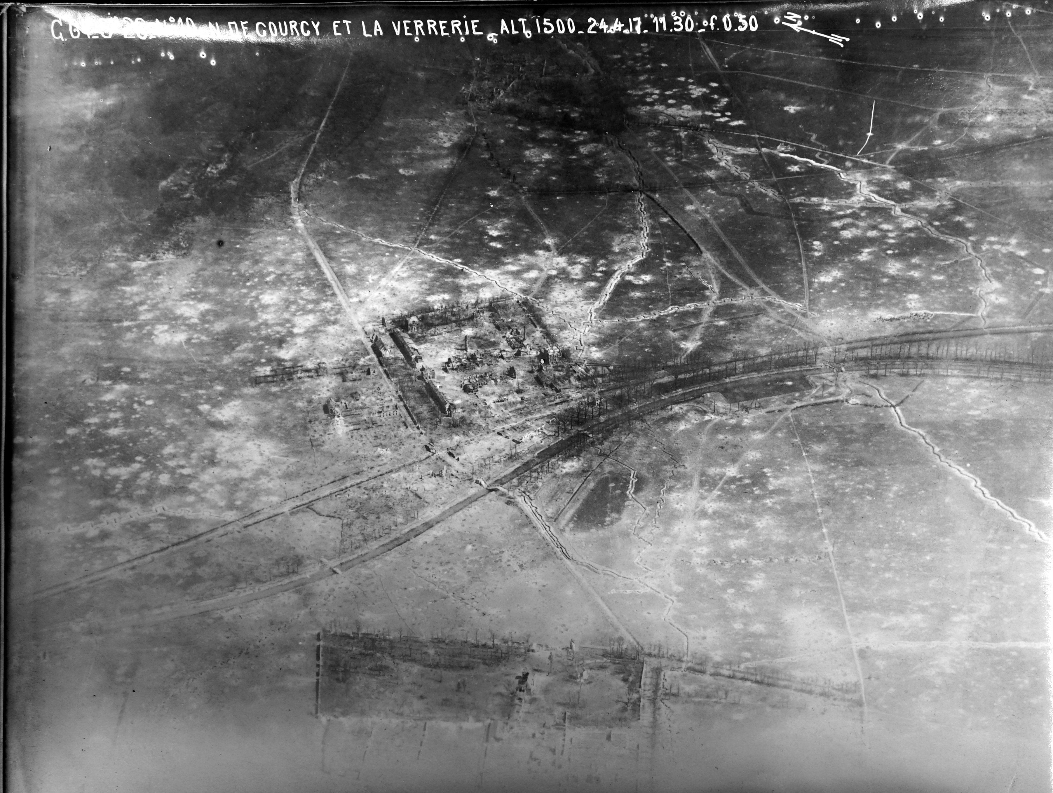 lors d'une exposition temporaire à Courcy.